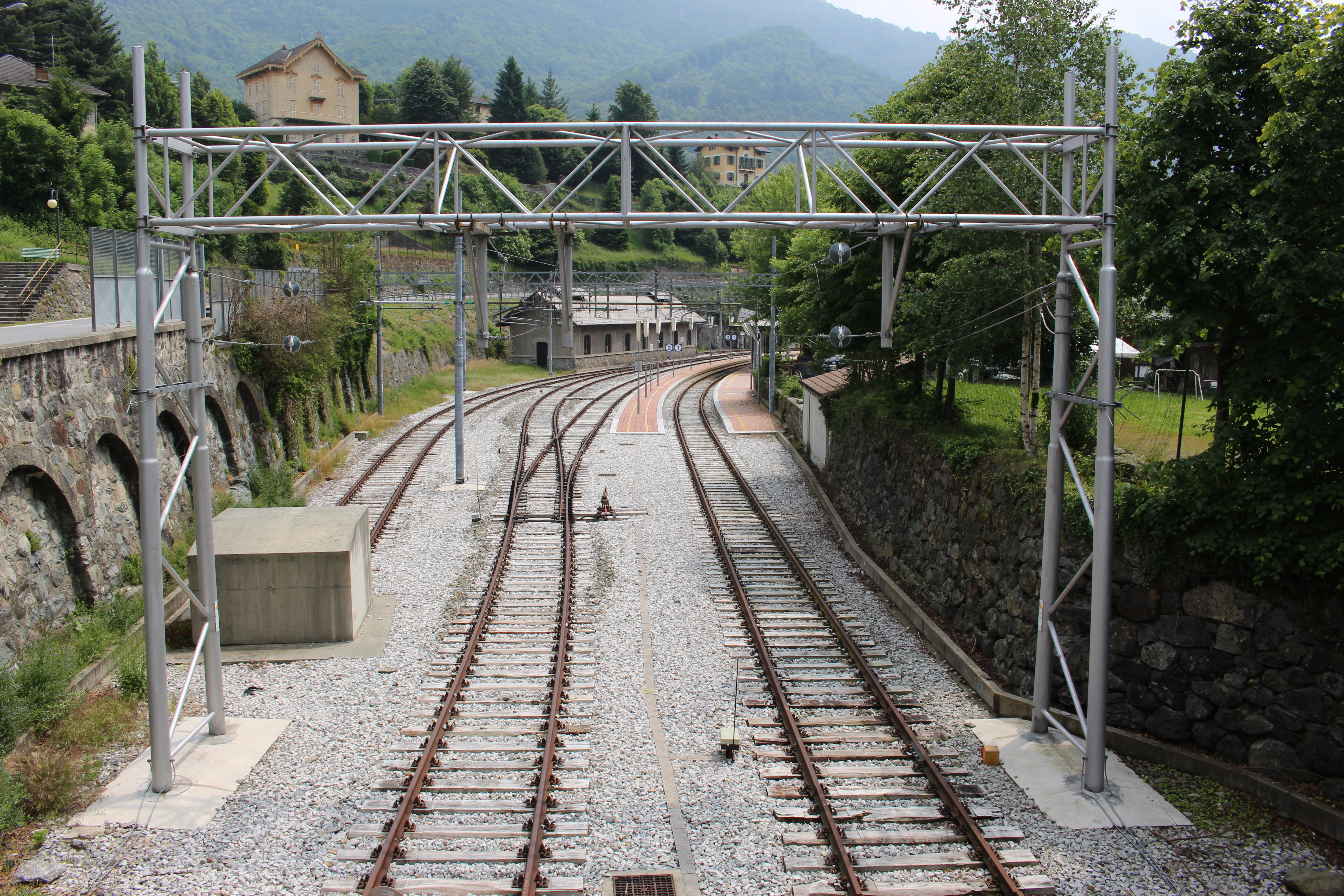 HieuMarco - Fotografia propria